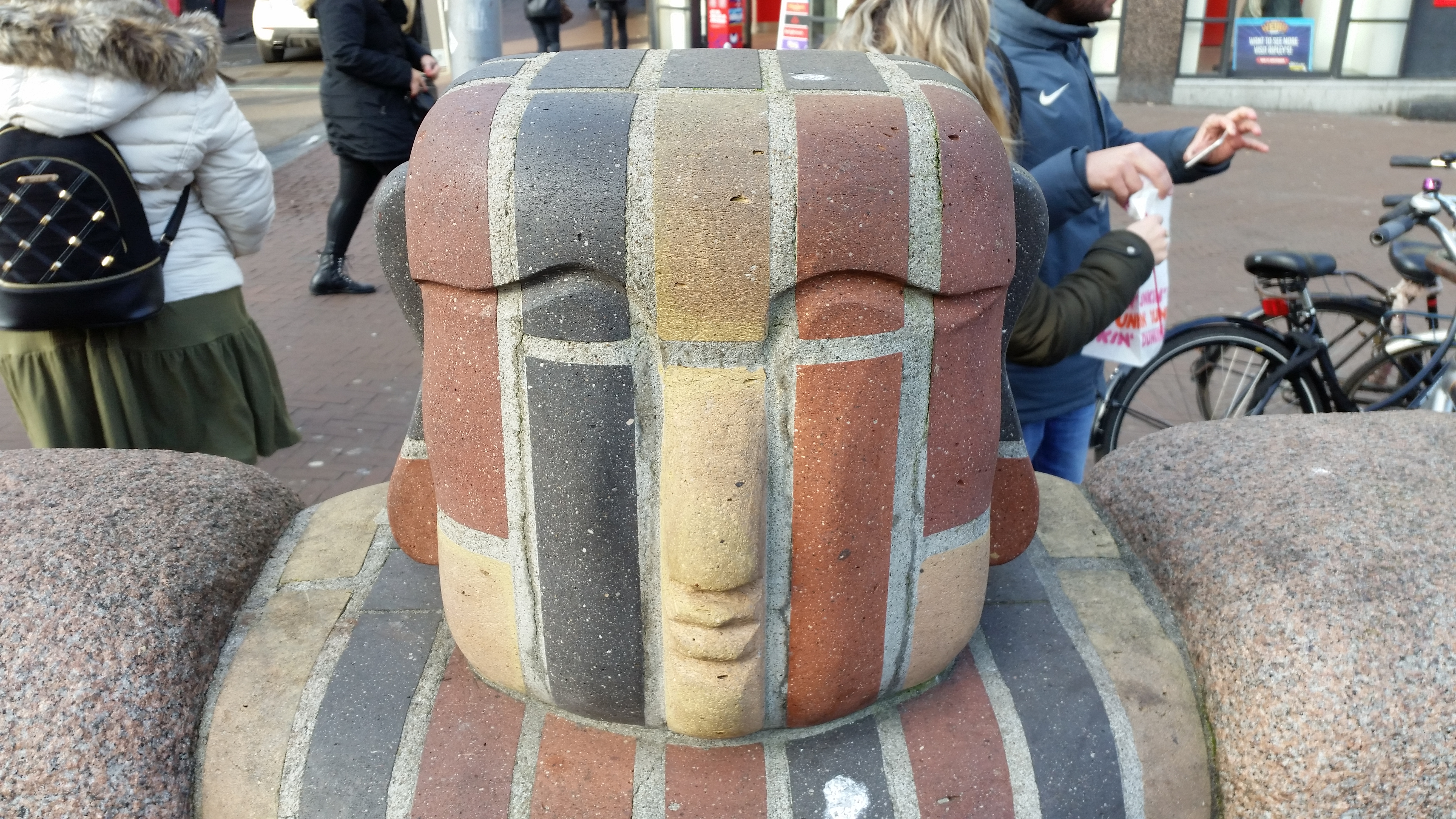 Impressie van Wandelend naar de Nieuwmarkt, beeldengroep Amsterdam-Centrum (januari 2020)